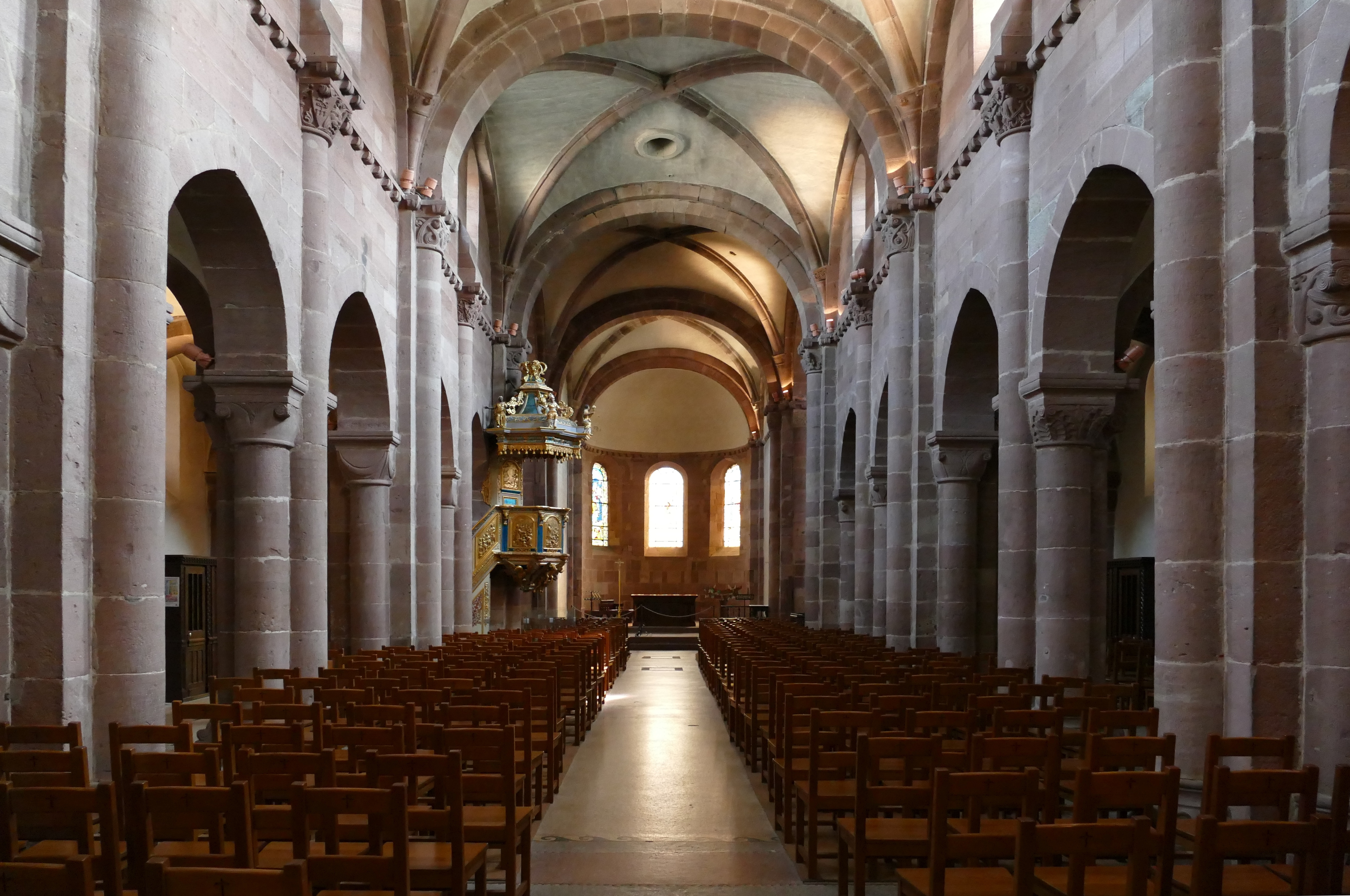 Alsace, Bas-Rhin, Sélestat, Église Sainte-Foy (PA00084981, IA00124586): Vue intérieure de la nef vers le chœur.